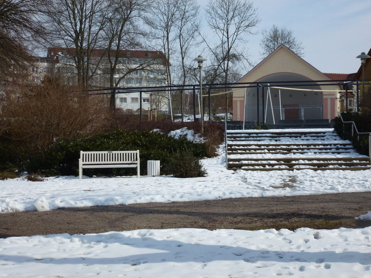 Musikmuschel im Kurpark (Vordergrund), Medianklinik in Bad Berka (hinter den Bäumen)